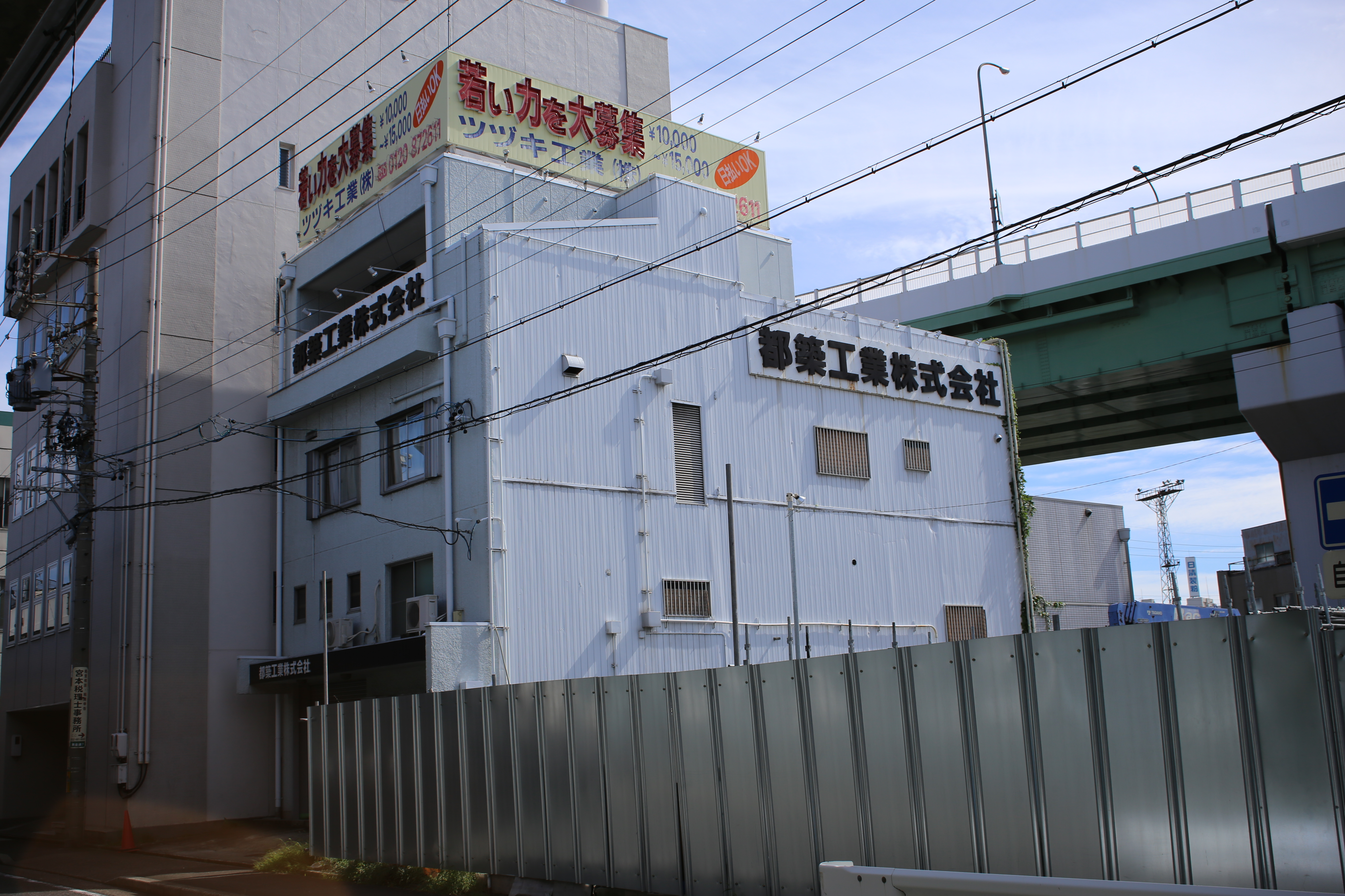 名古屋市中村区黄金通の都築工業本社を東側公道北側より撮影